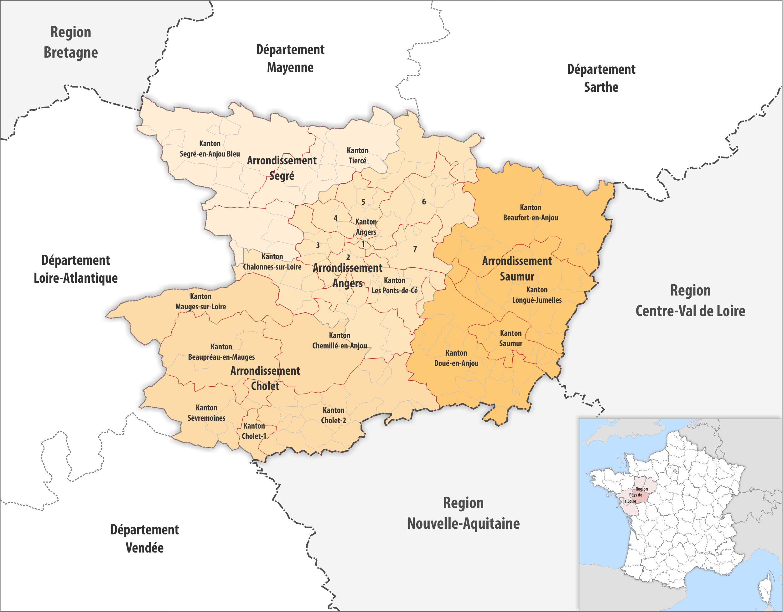 Gemeinden, Kantone und Arrondissemente im Departement Maine-et-Loire